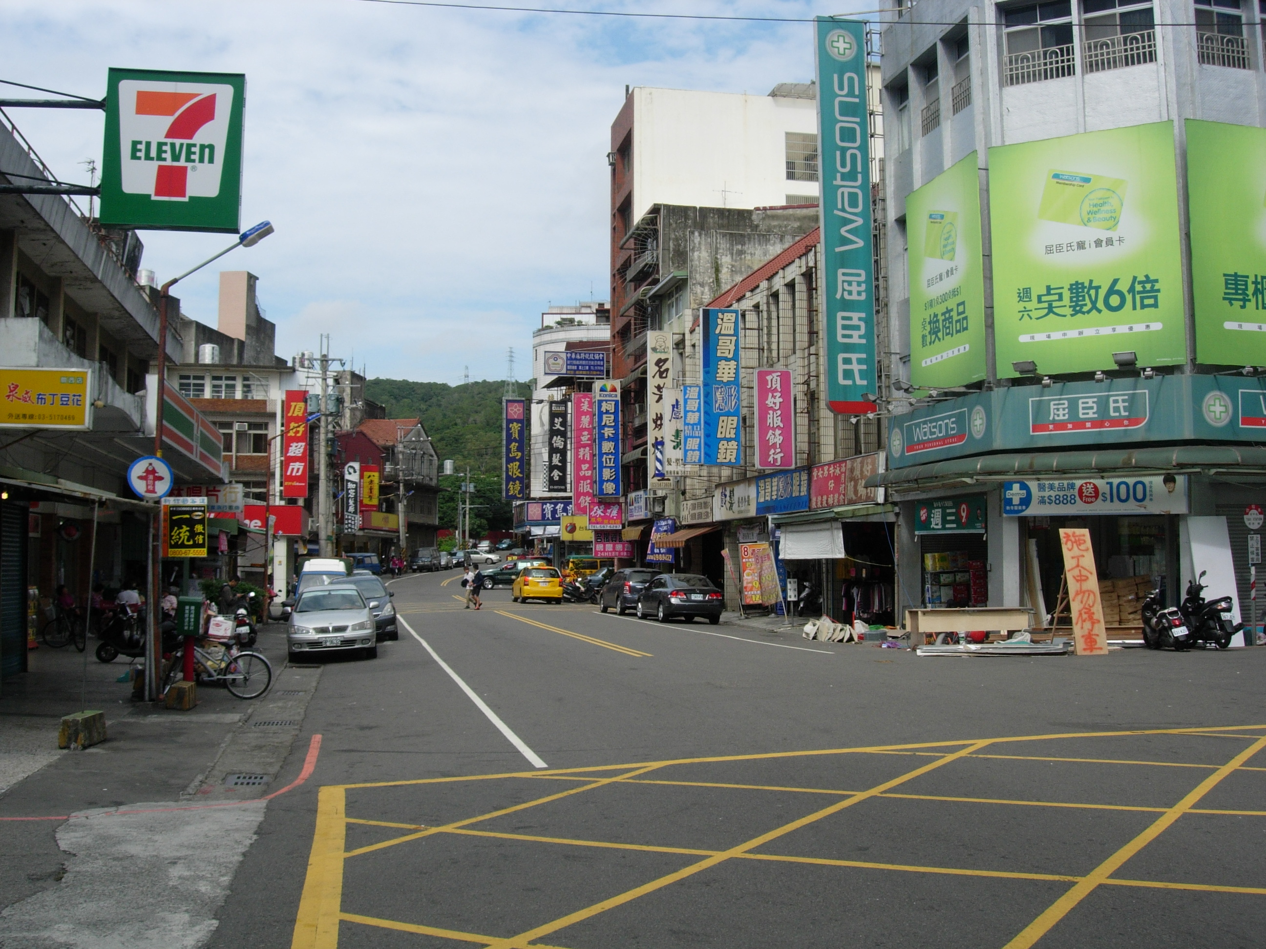 中文（台灣）: 關西站前街道。